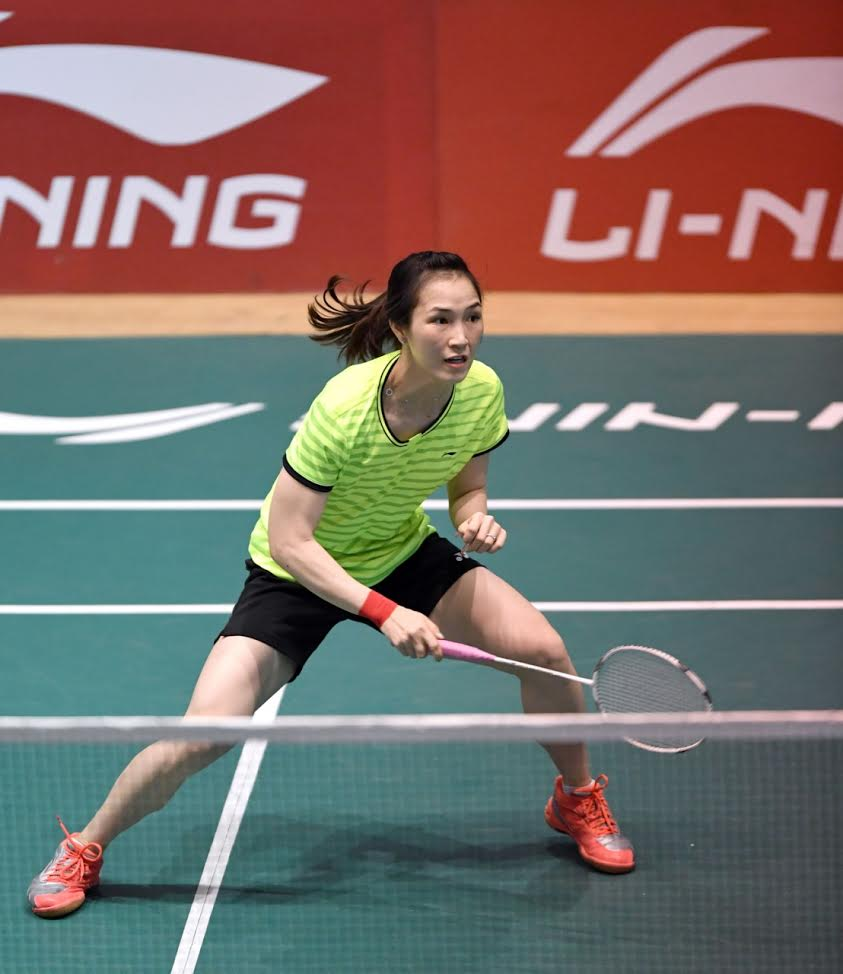 Vũ Thị Trang là nữ tay vợt cầu lông số một VIệt Nam.